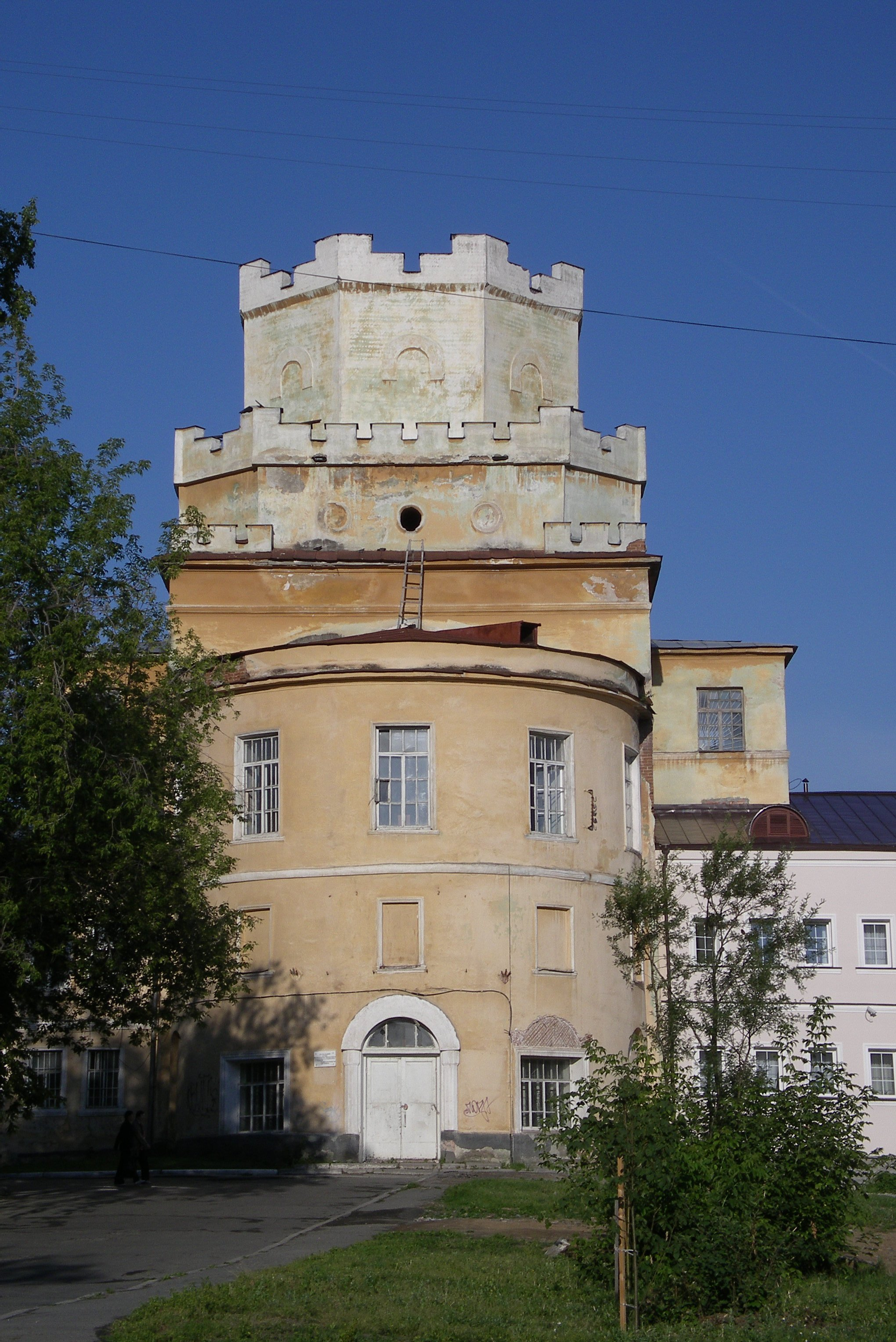 Монастырь Ново-Тихвинский (комплекс зданий Ново-Тихвинского монастыря) (Свердловская область, Екатеринбург, Декабристов улица, район Зеленой рощи)